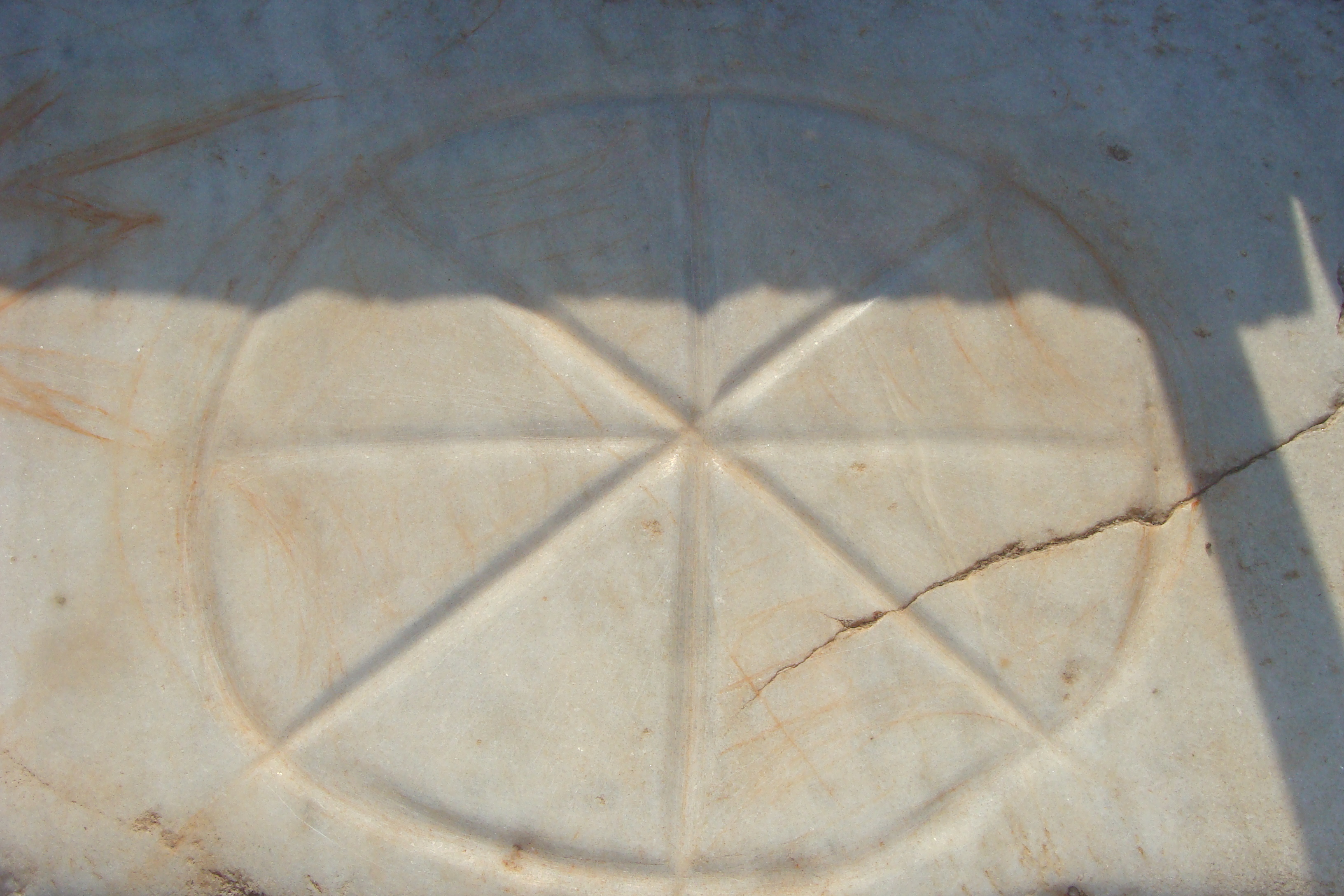 Krzyż słoneczny. Ruiny antycznego miasta Efez.